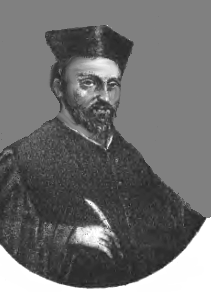 Stanisław Warszewicki